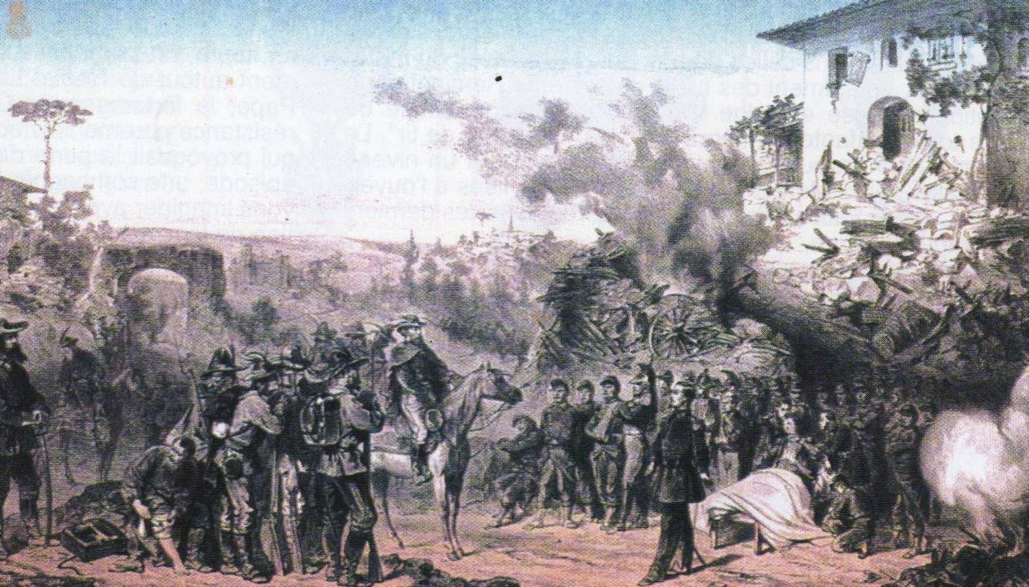 Capitulation des troupes pontificales à Monterotondo devant les Garibaldiens, 26 octobre 1867. Lithographie de Mès, gravure de Turgis.